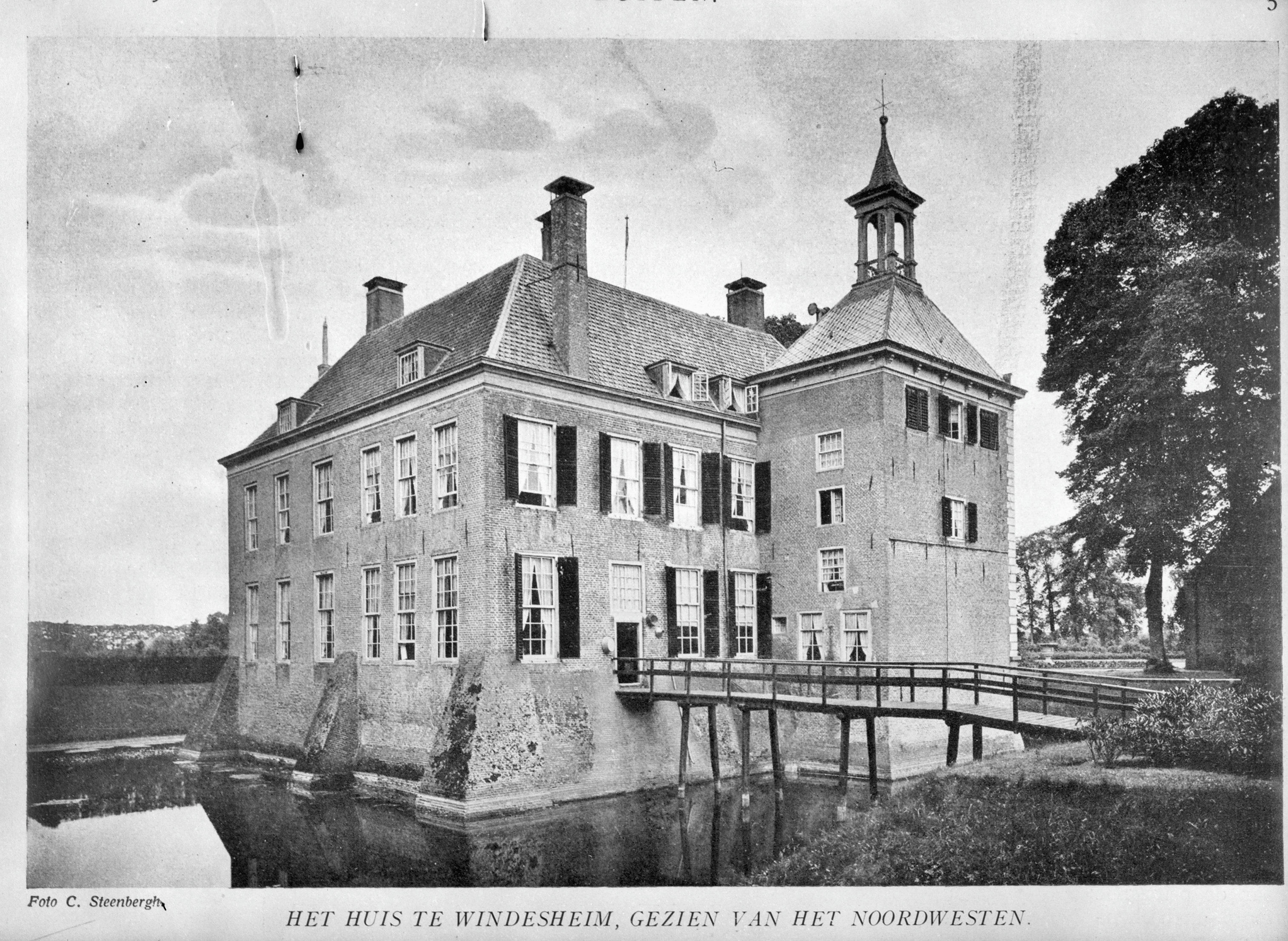 Buitenhuis Windesheim: Overzicht Huis Windesheim, gezien vanuit het noordwesten - Reproductie uit het tijdschrift "Buiten" nr. 16, (1922). -zie ook ST-2.317 (opmerking: In 1967 is de gemeente Zwollerkerspel opgeheven en verdeeld over de gemeenten Zwolle, Genemuiden, Hasselt, Heino en IJsselmuiden. - In: Buiten ; 16(1922), nr. 1, p. 5)